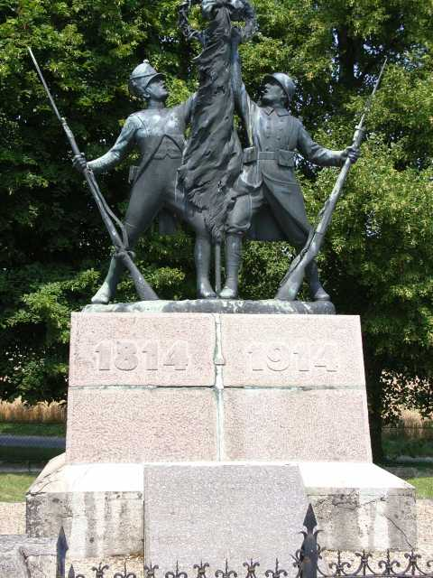 Hurtebise Farm, Monument 1814-1914